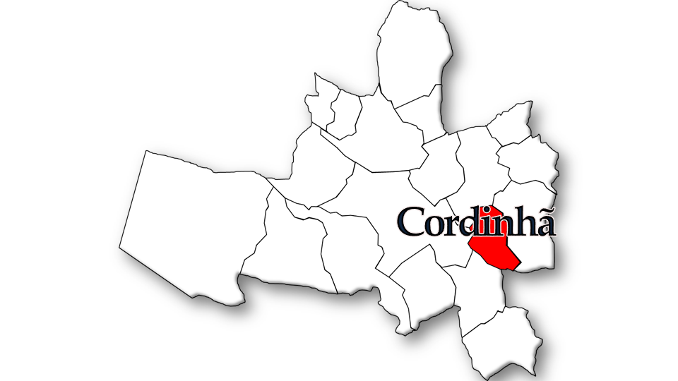 Português